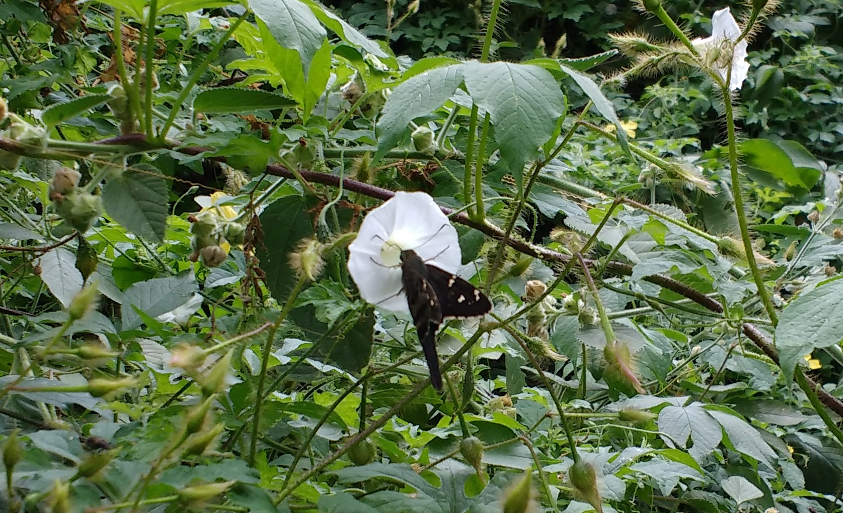 Exemplar da borboleta Urbanus proteus na cidade de Caetité, estado da Bahia, Brasil.